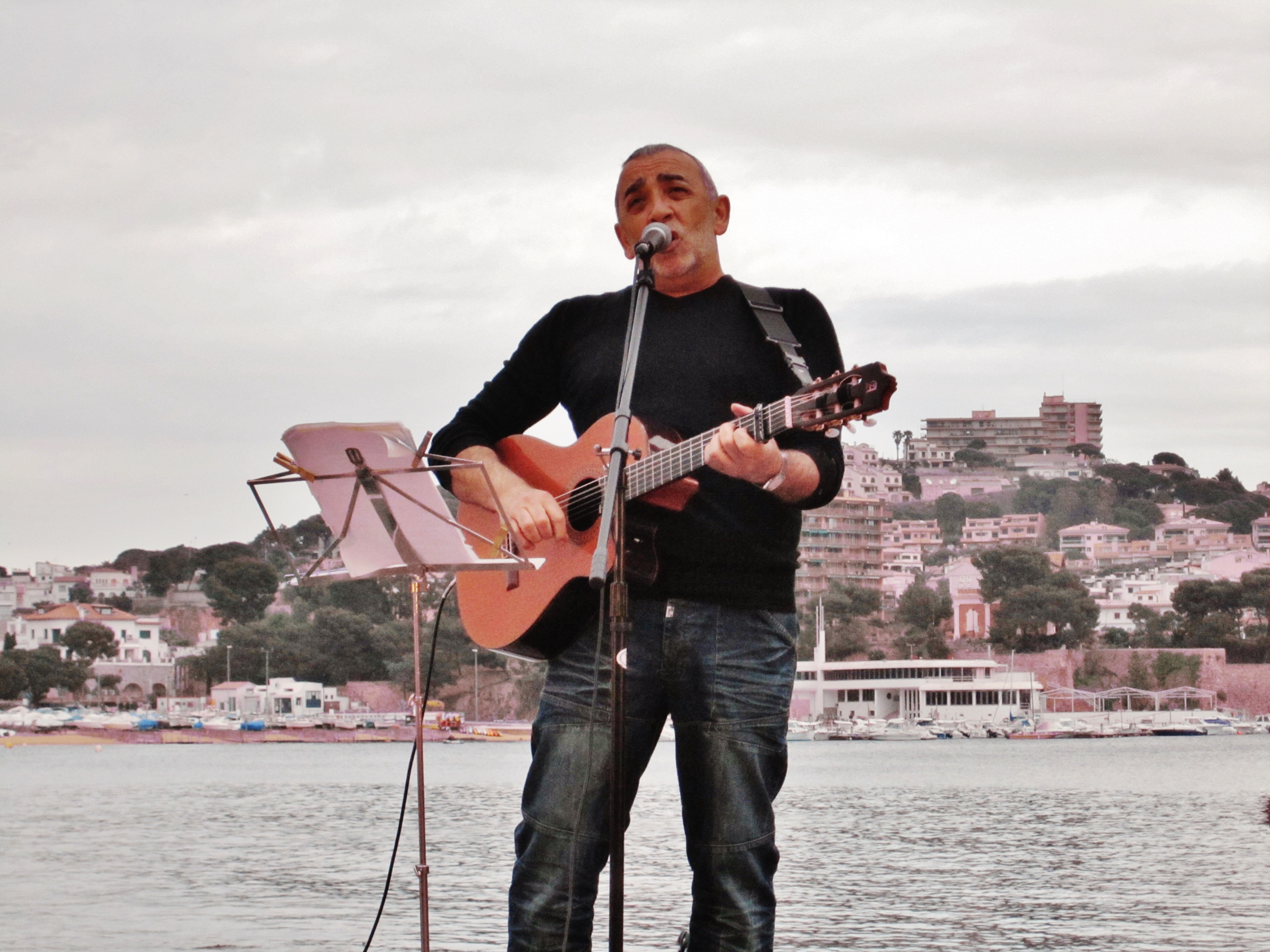 El cantautor catalán Josep Andújar "Sé" cantando en Sant Feliu de Guíxols (provincia de Girona). 11 de mayo de 2013.